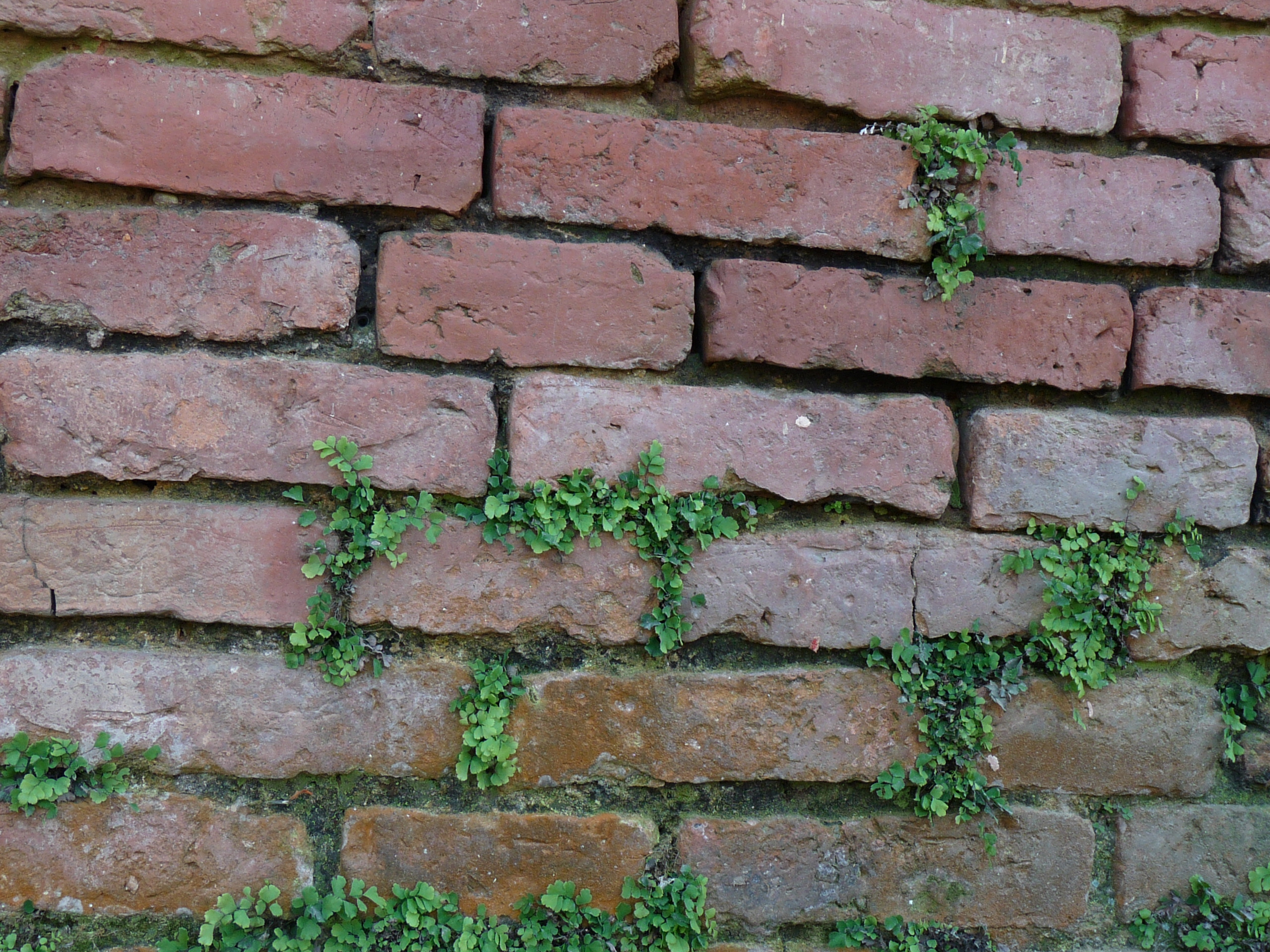 Végétation rupicole sur mur de brique au Népal